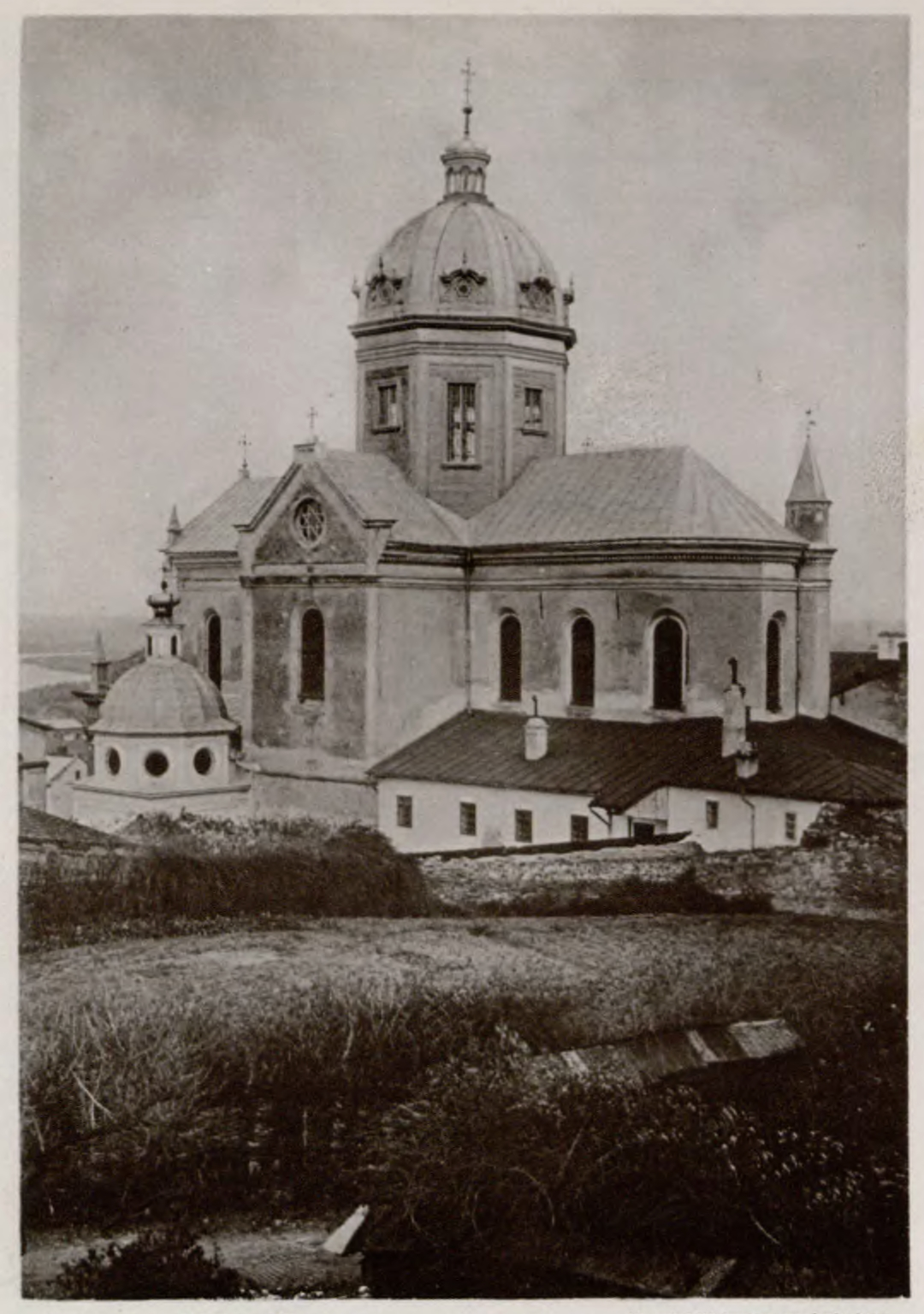 Собор святого Івана Хрестителя, Перемишль.